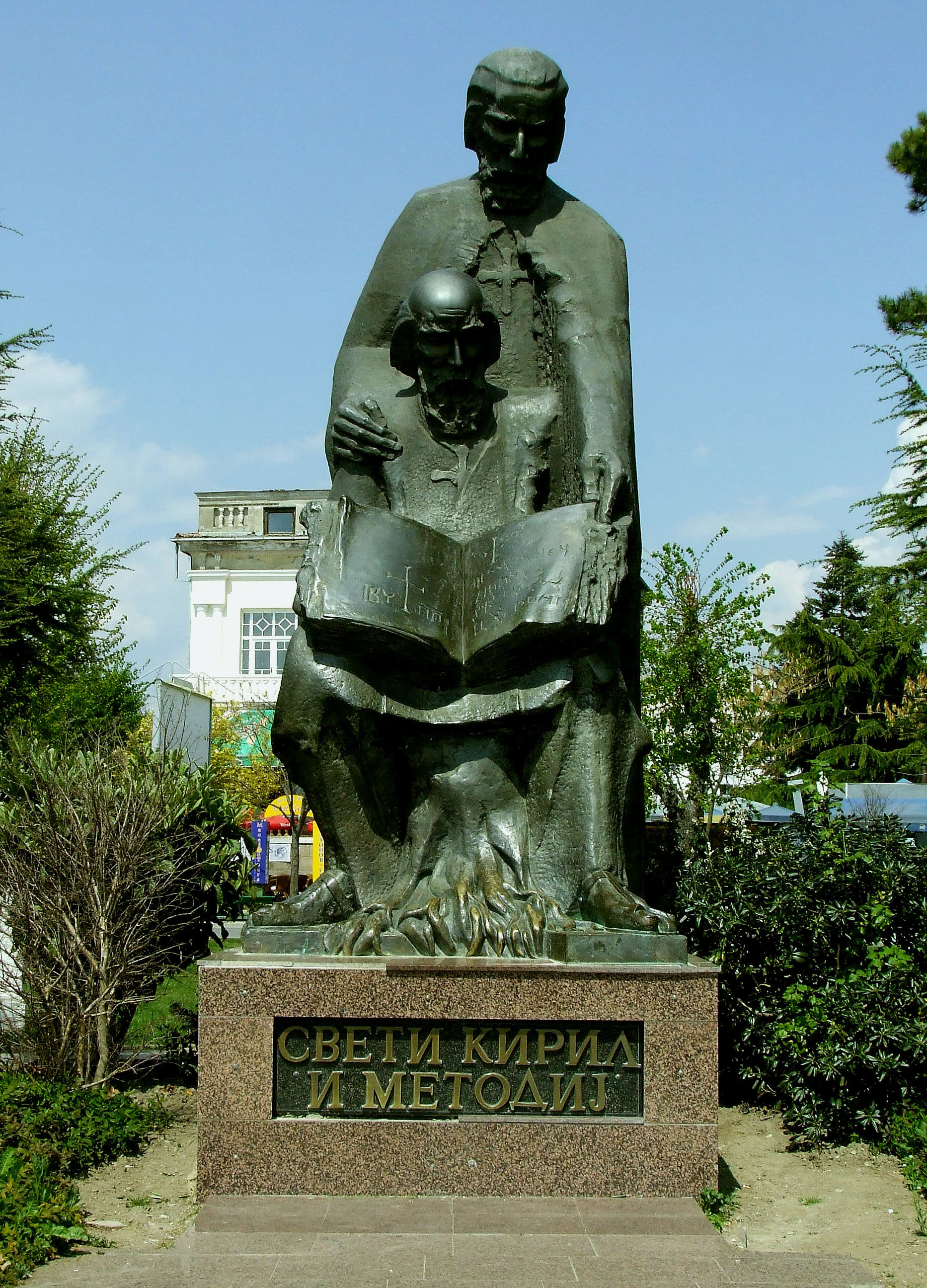 Sveta Ciril in Metod, Ohrid